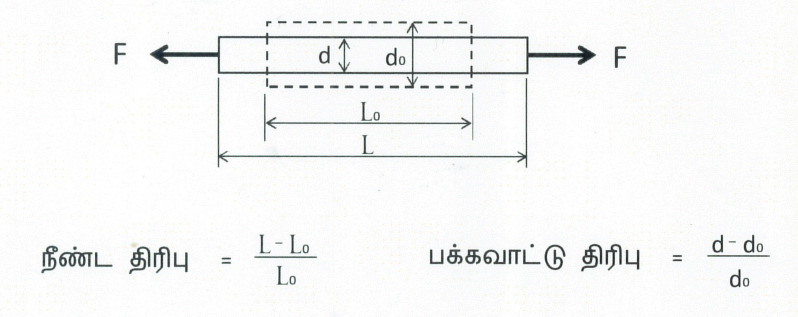 திரிபு(strain)